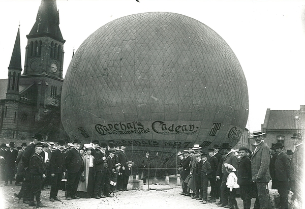 luftballong, mennesker, publikum, Johanneskirken, Cetti, Francesco